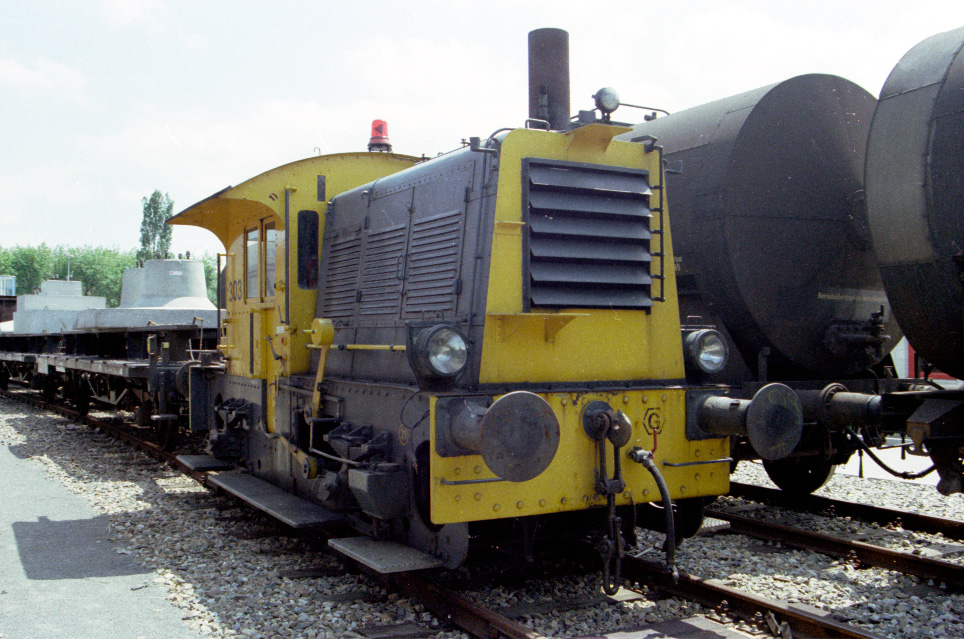 Locomotor 303, de Sik, in zondagsrust op emplacement Gouda, 12 juni 1988.